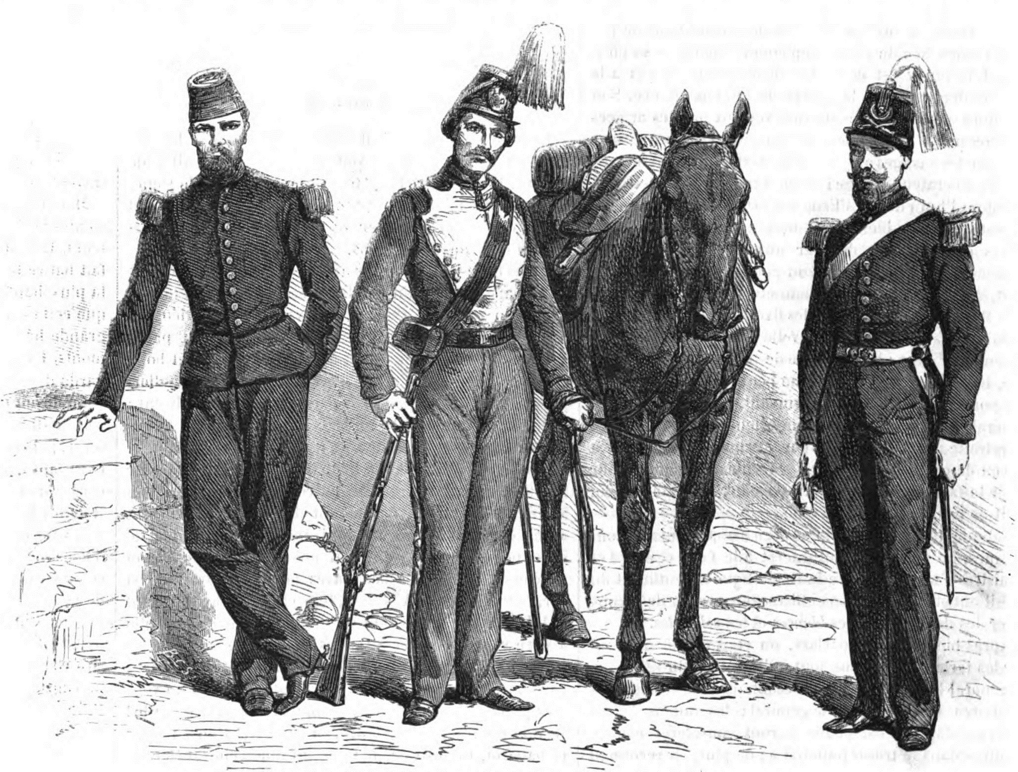 Armée de la République Argentine: Cavalerie et artillerie.